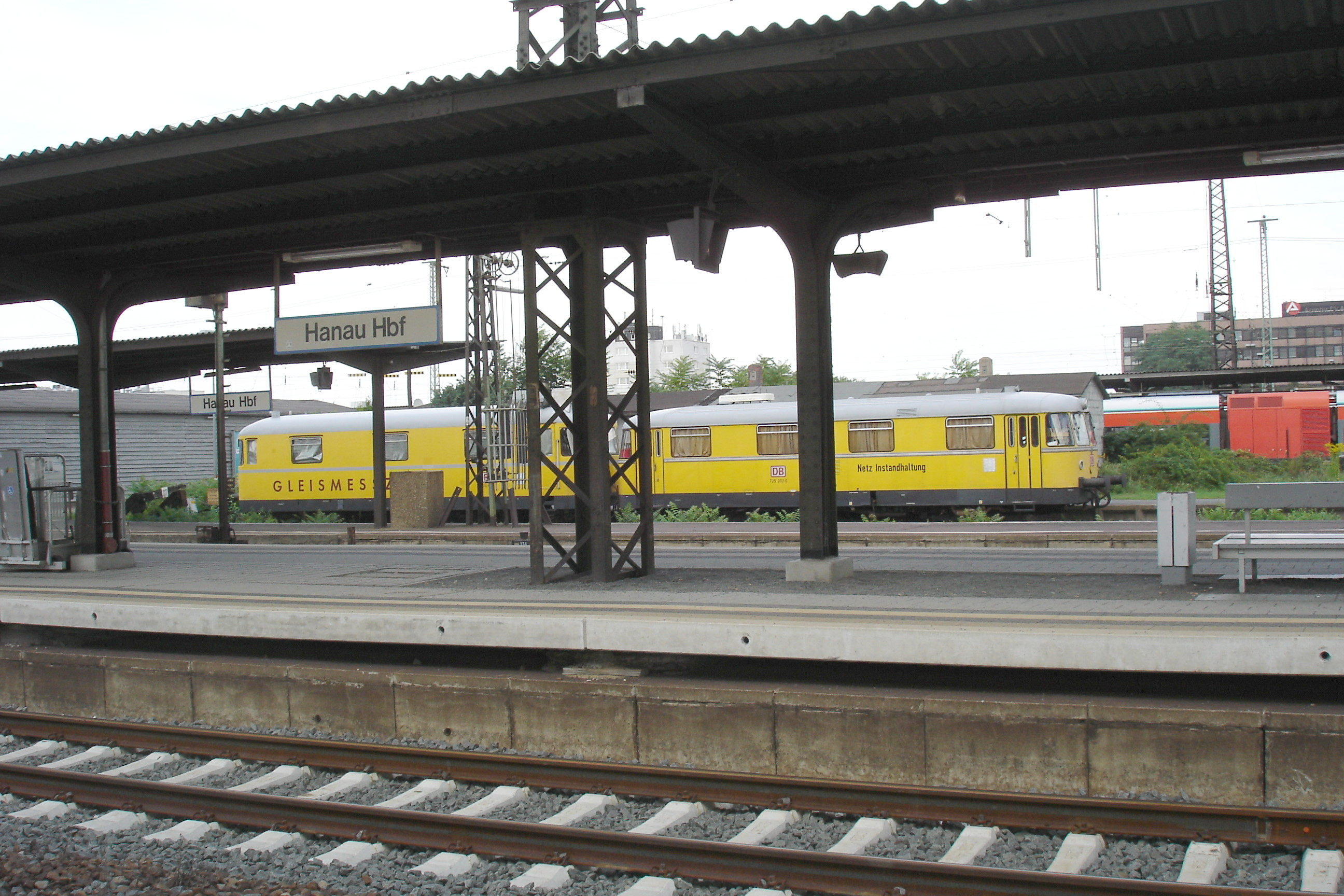 Hauptbahnhof Hanau am Main, Arbeitsfahrzeuge